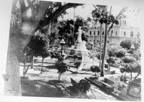 Parque Jorge Isaacs. En el centro vemos la estatua en homenaje al poeta, al frente el Batallón Pichincha. Cali. 1940.